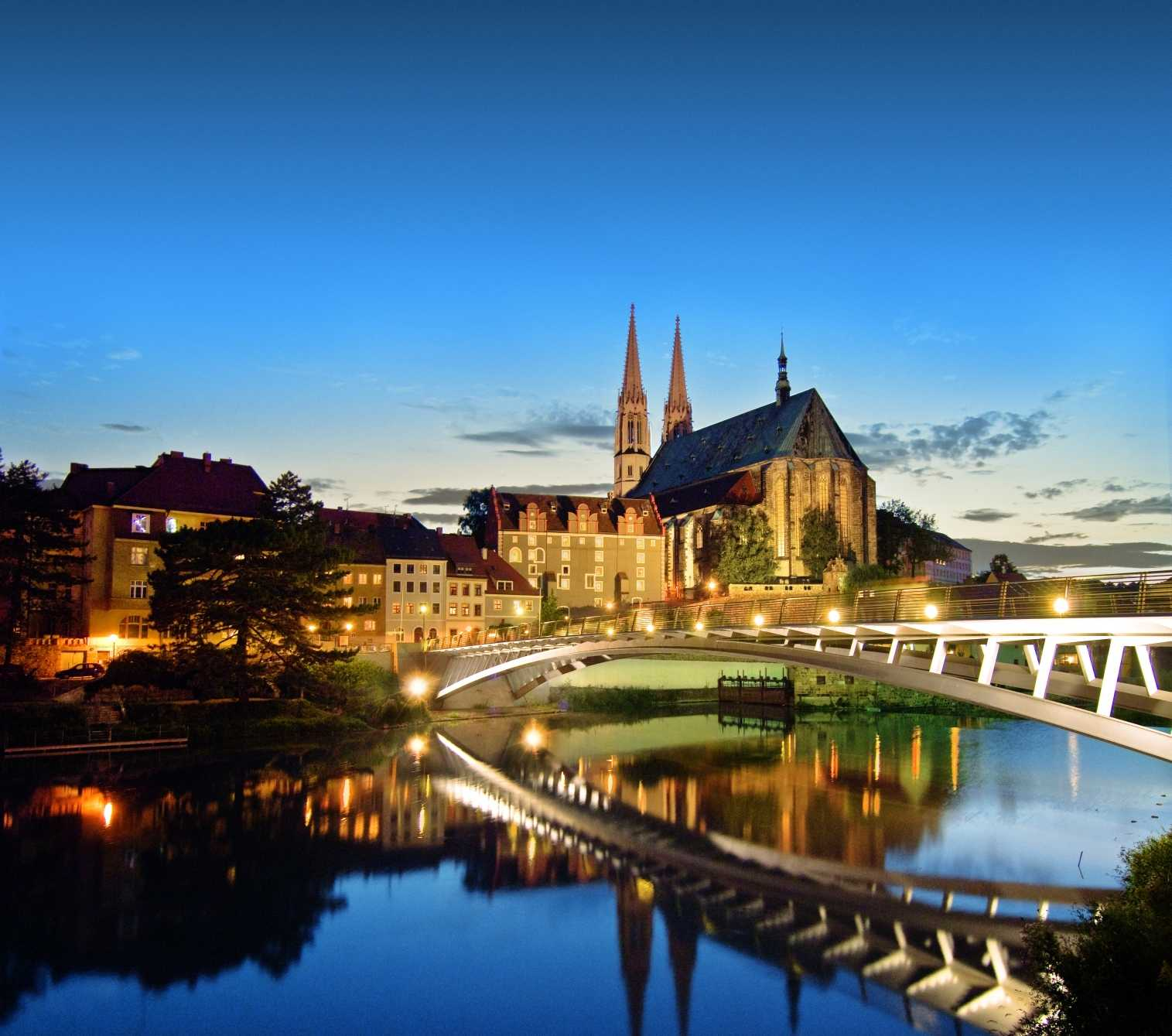 Görlitz, Peterskirche